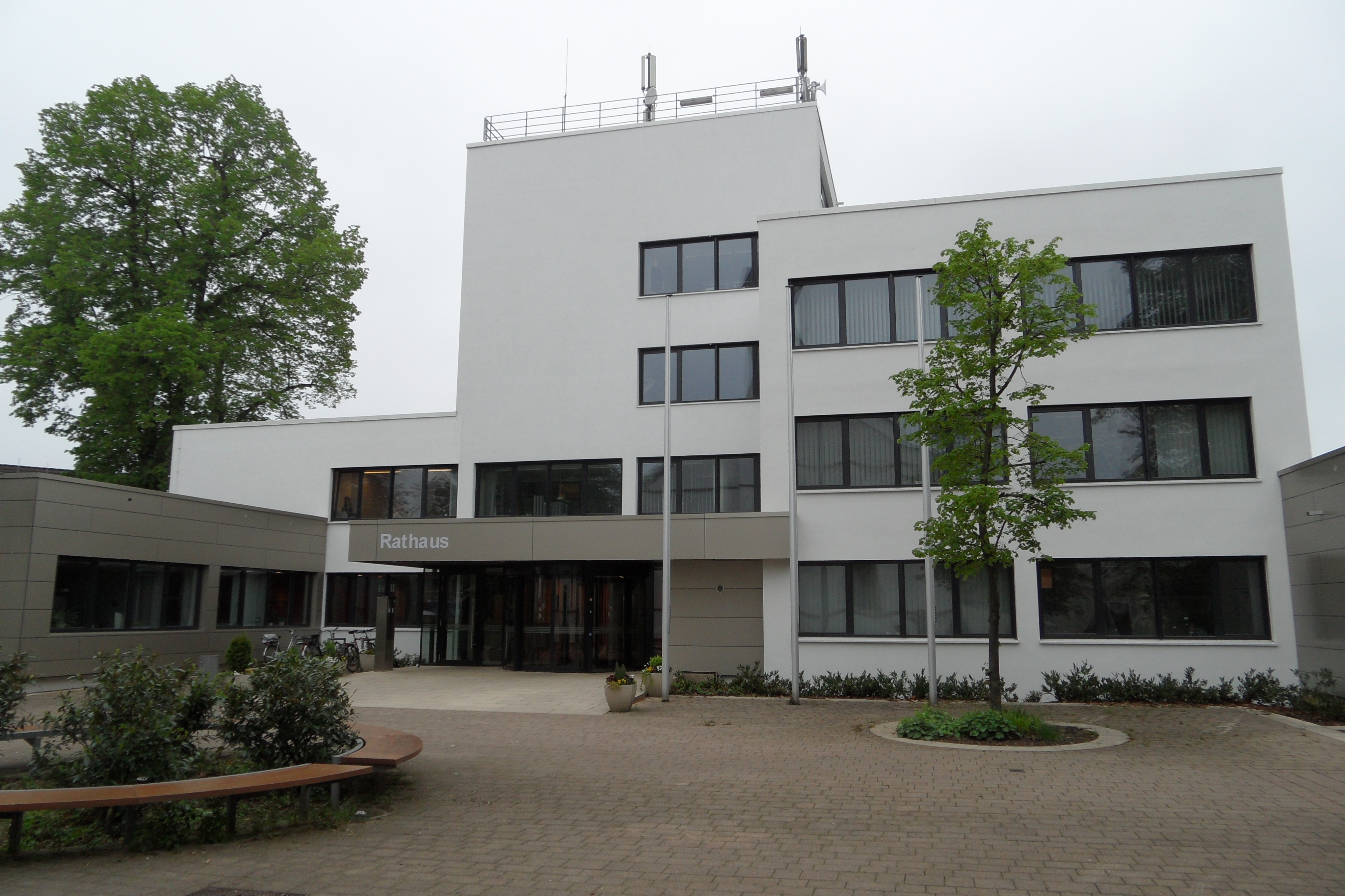 Rathaus Leopoldshöhe 2014